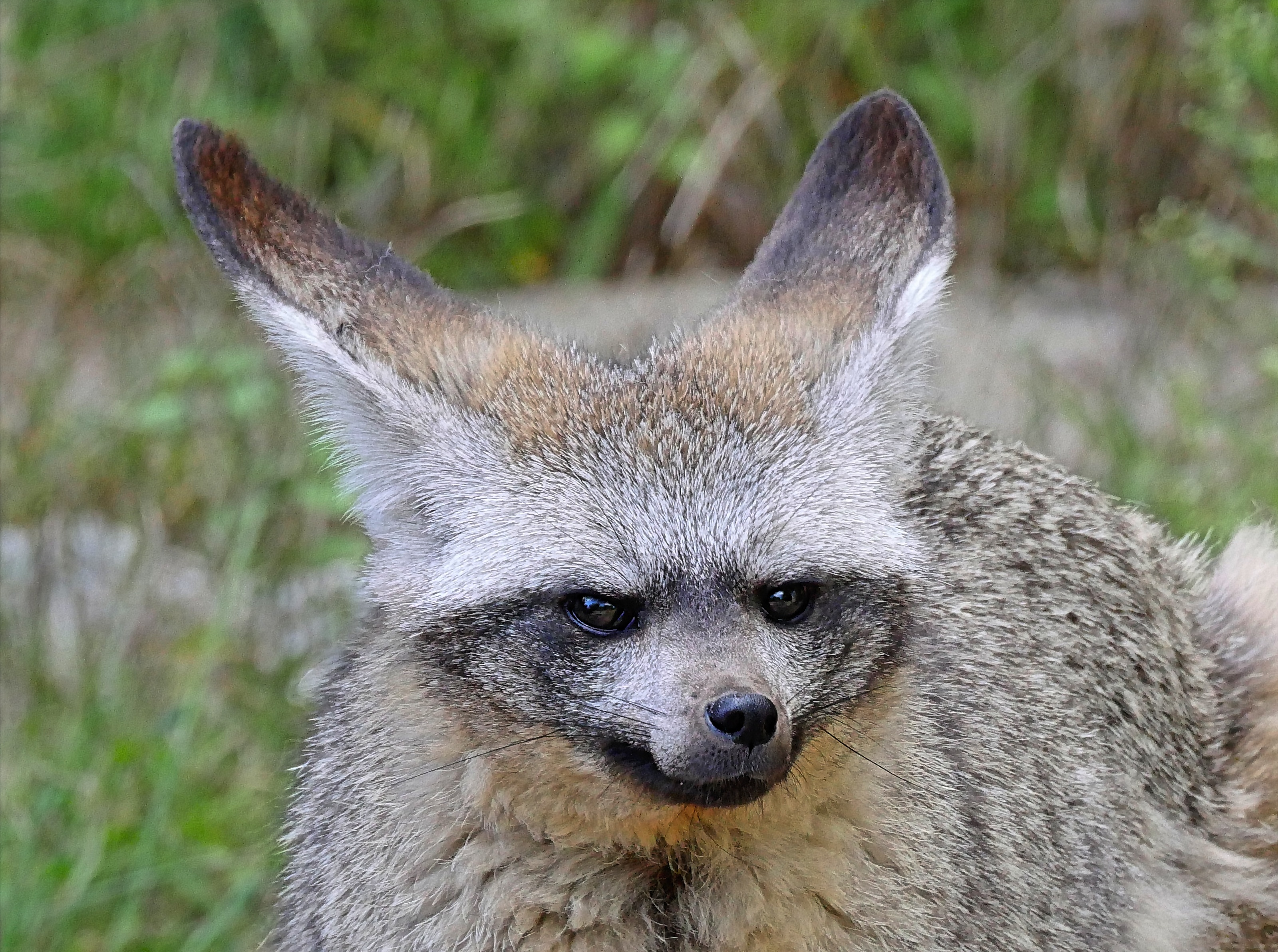 auch Großohrfuchs